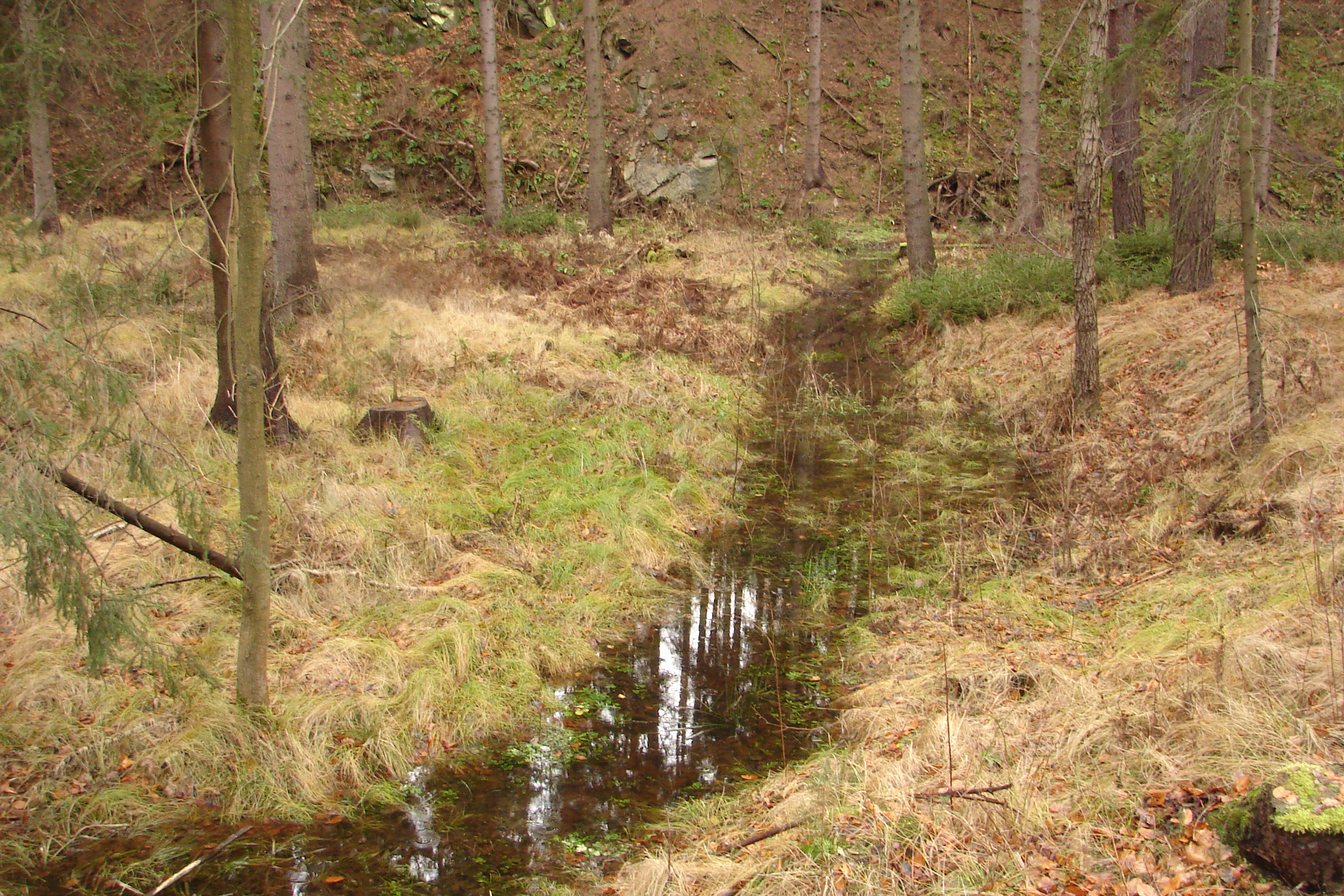 Flächennaturdenkmal Prießnitzaltarme im Prießnitzgrund, nahe der Heidemühle, Dresdner Heide